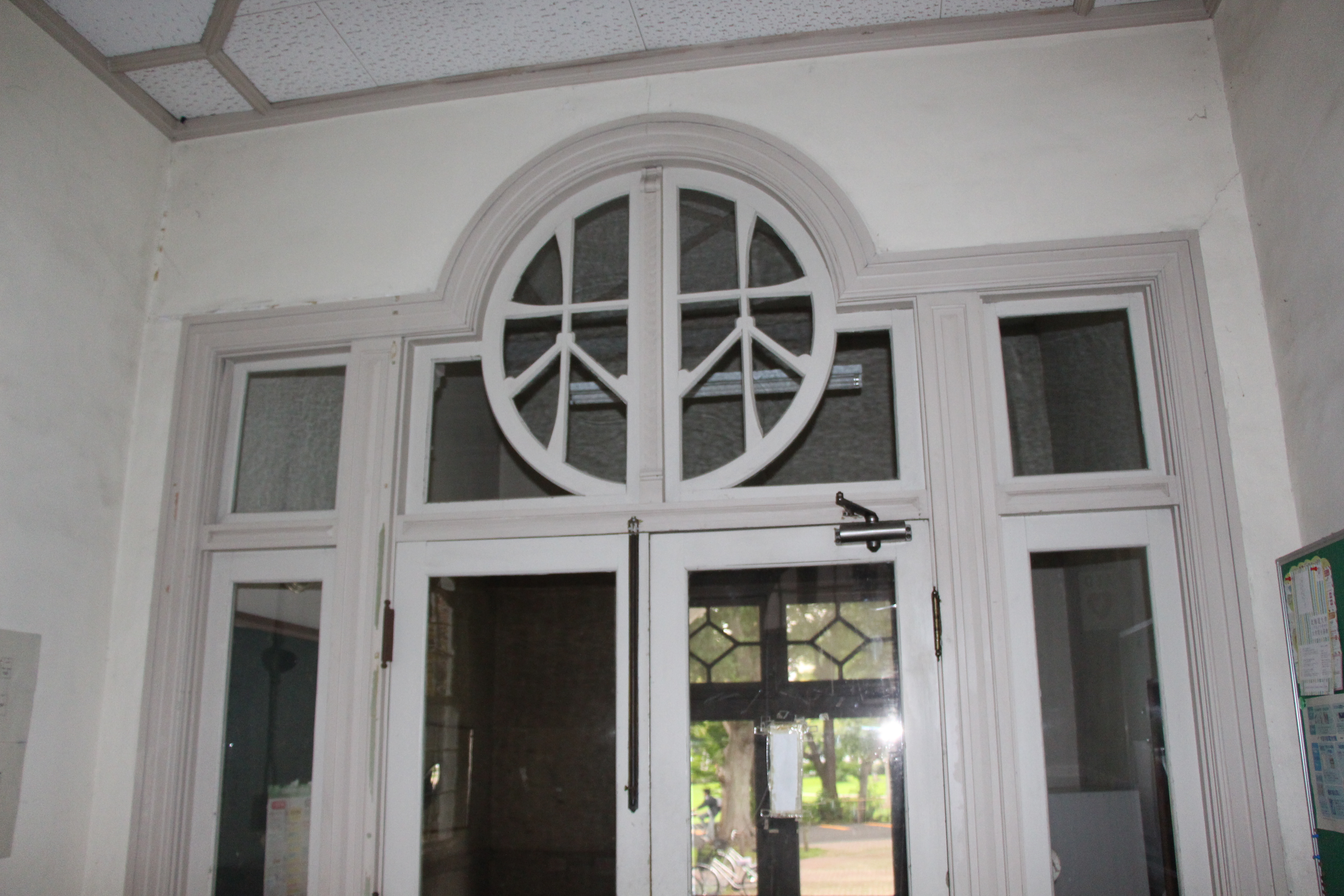 撮影日 2015/09/06